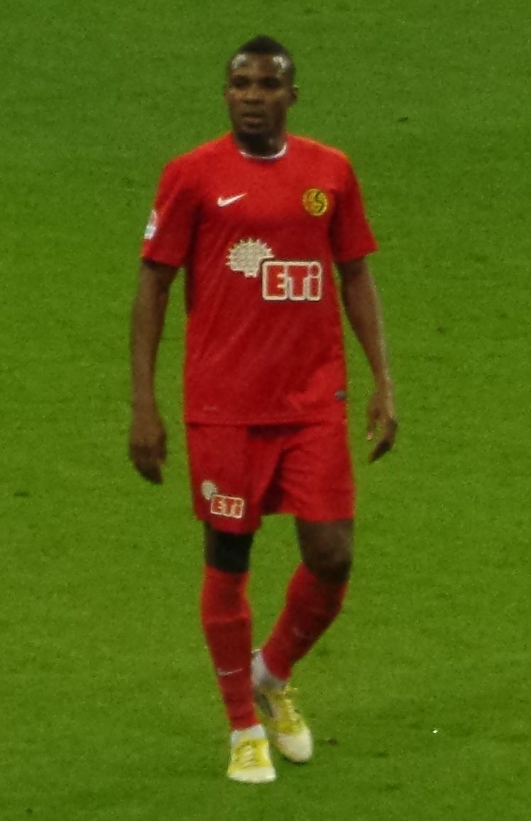 Akaminko'13-14